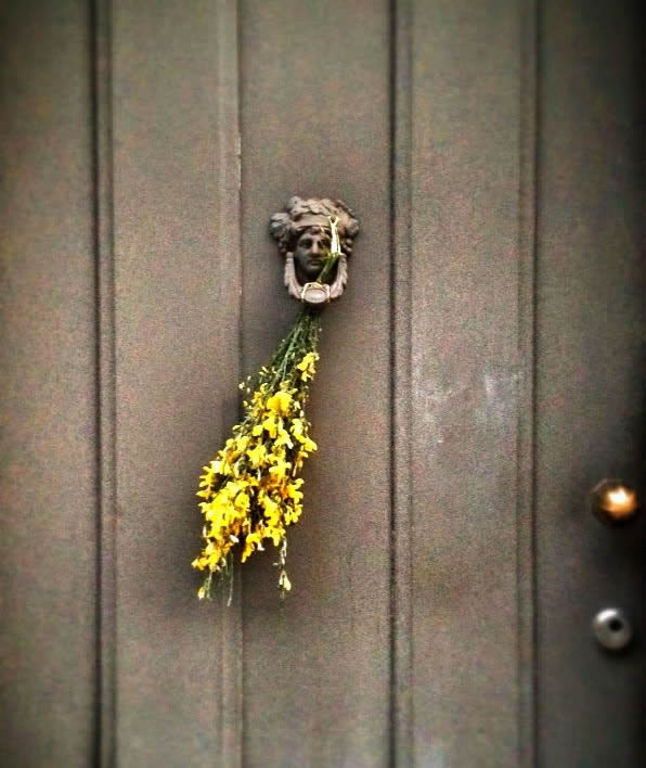 Os Maios